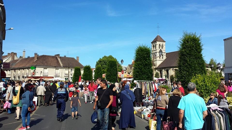 Brocante, centre-ville de Deuil-La Barre (7/06/2015)